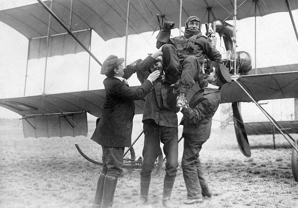 Benno König, der Sieger des Deutschlandfluges 1911 wird von seinen Freunden gefeiert. An der Unterseite der rechten Tragfläche ist eine "19" zu erkennen. Benno König hatte beim Deutschlandflug die Startnr. 19.